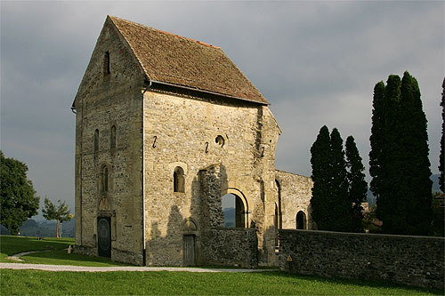 Die Ruine des Klosters Rüeggisberg